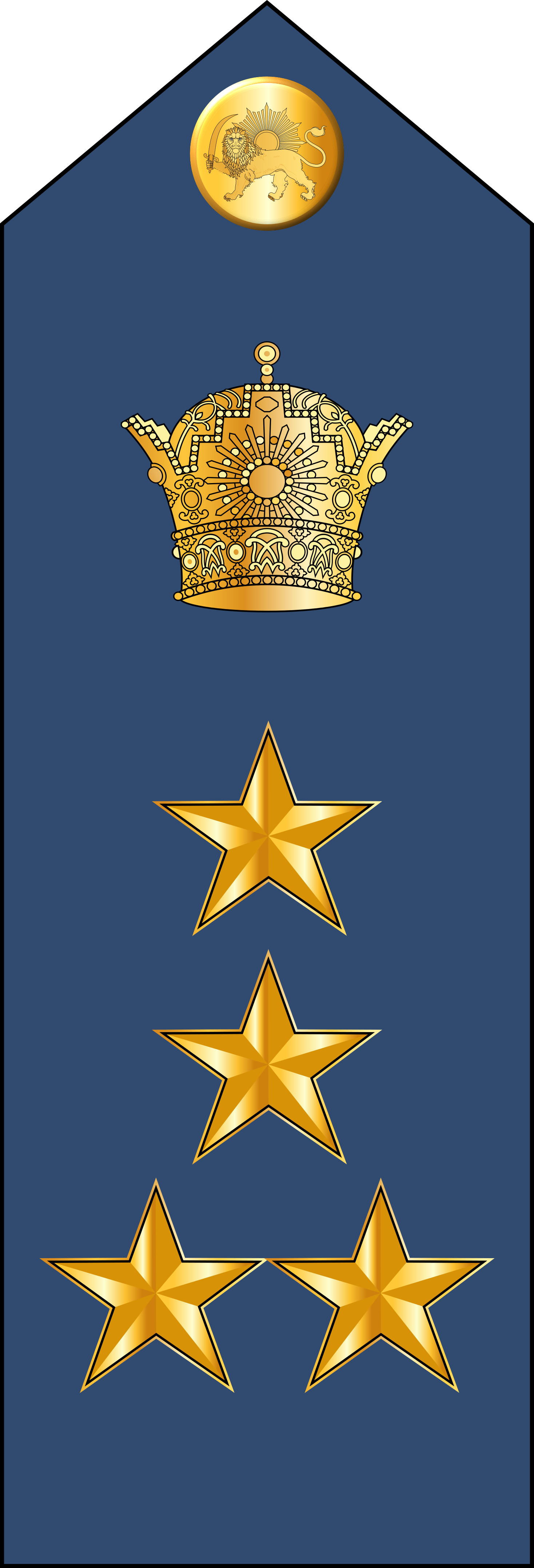 نشان ارتشبدی نیرویی هوایی شاهنشاهی ایران